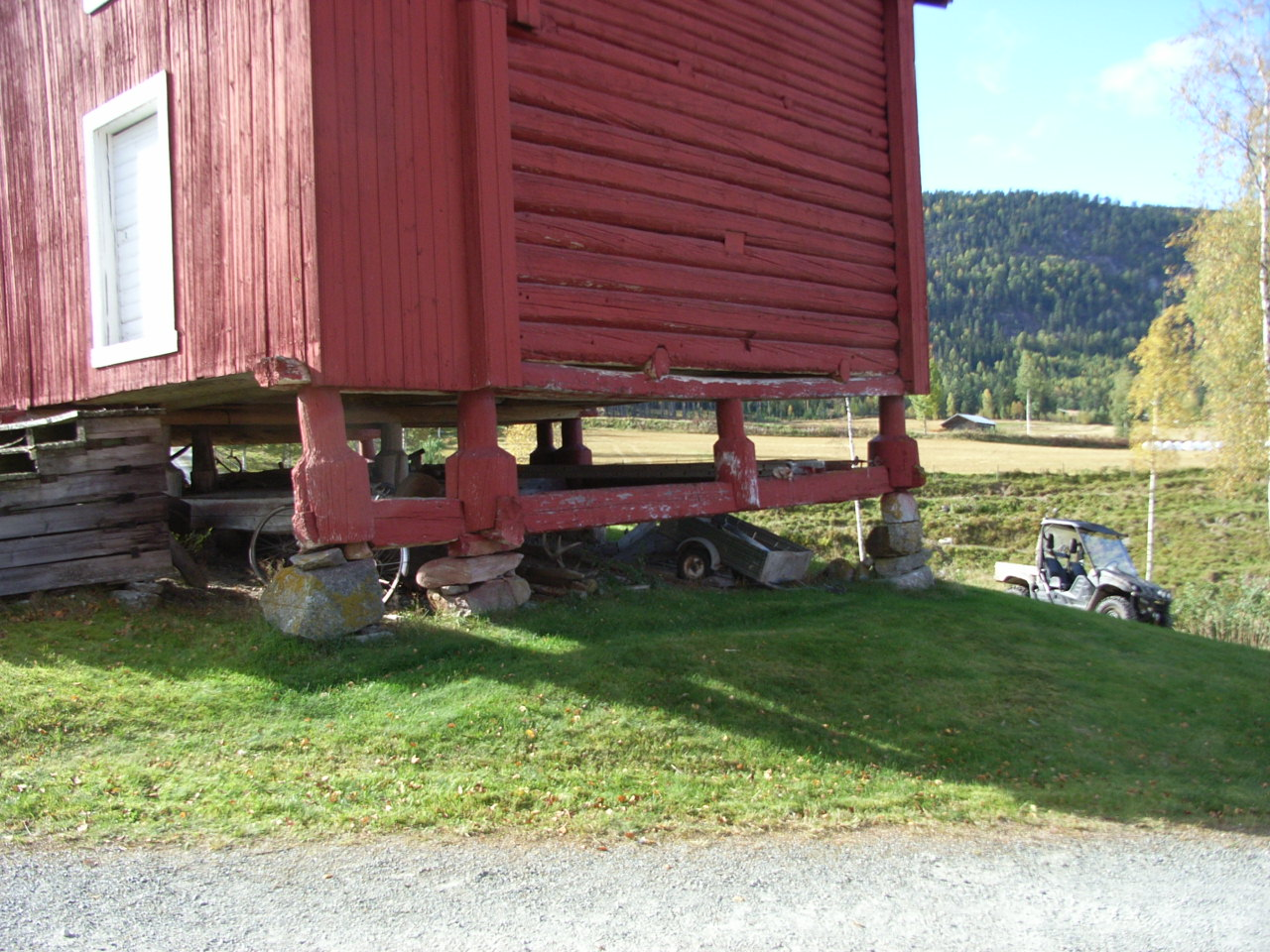 Stabbur i Sigdal i Buskerud, Noreg.